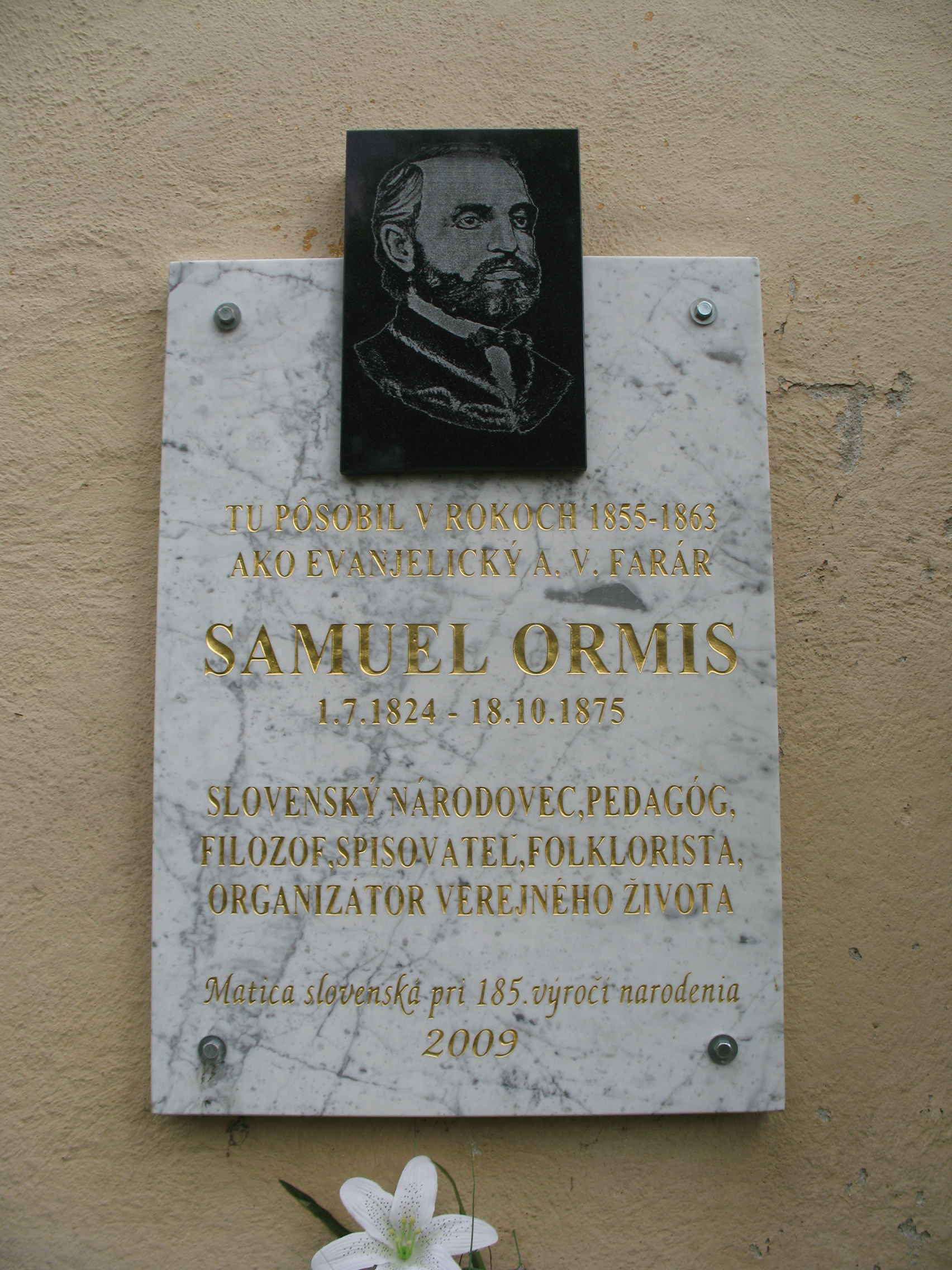 Alsósajó